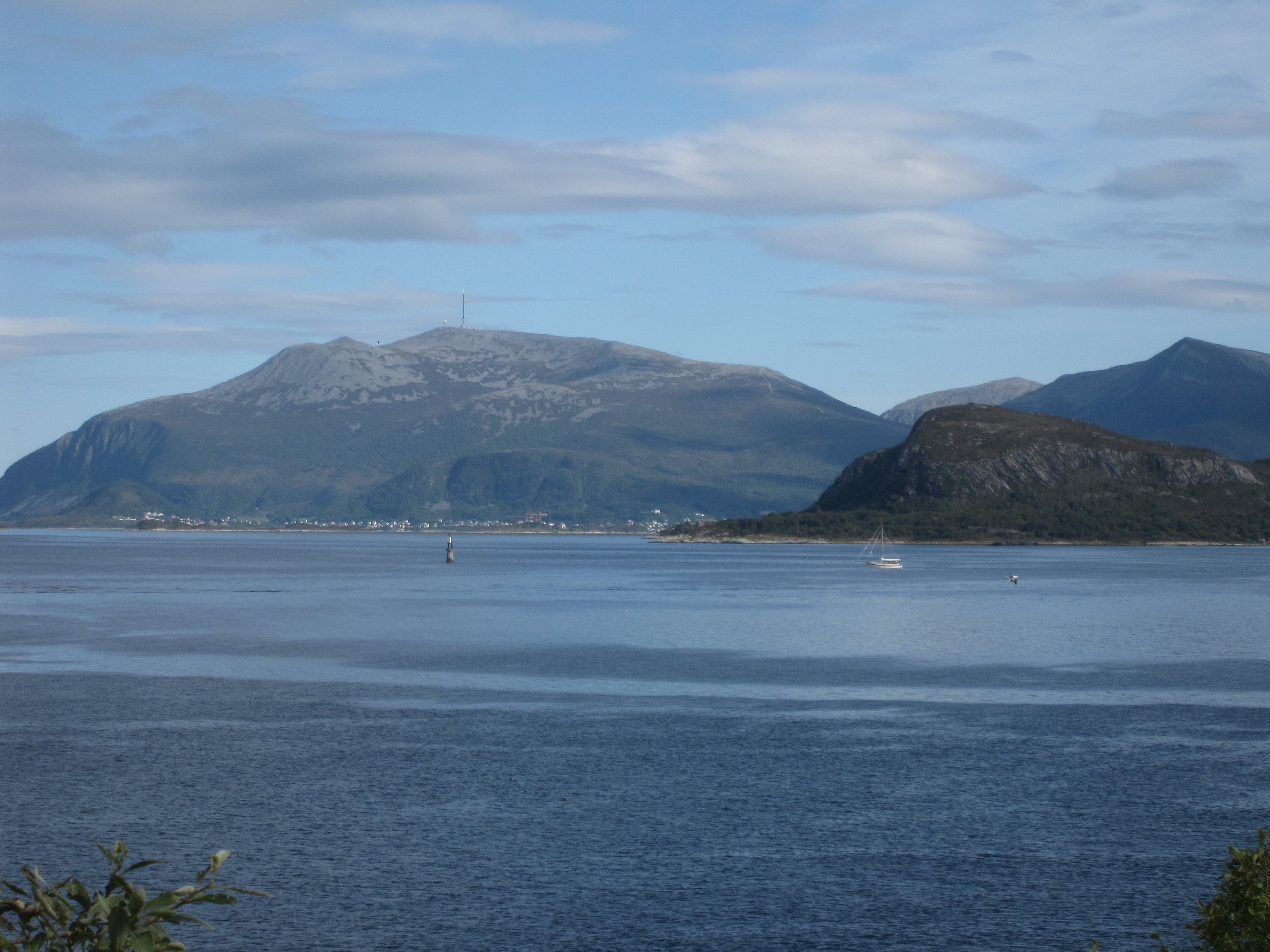 Gamlemsveten (790 moh.), Haram kommune, september 2011 sett sørfra. Hurlaveten ( 733 moh.) ligger til venstre. Sett fra Sør